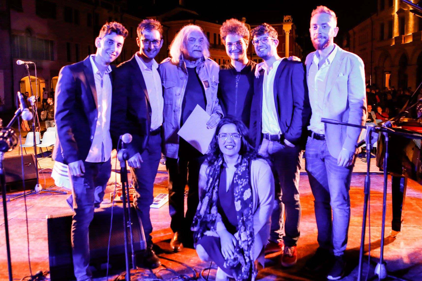 La band #RedIng Project con Enrico Rava dopo aver vinto il Premio Nazionale delle Arti Jazz